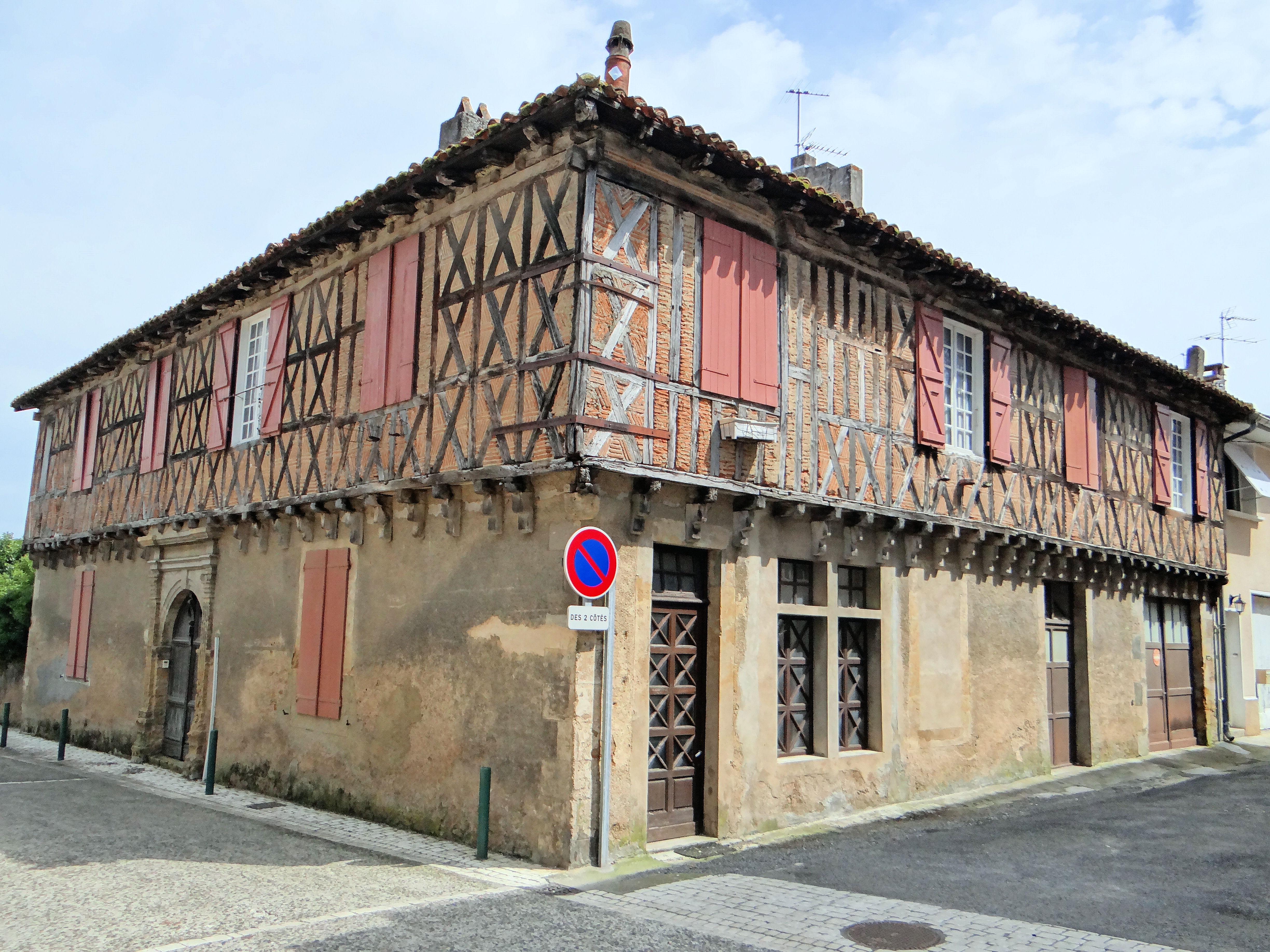 Masseube - Maison rue du commerce - Façades sur la rue du commerce et l'impasse du couvent